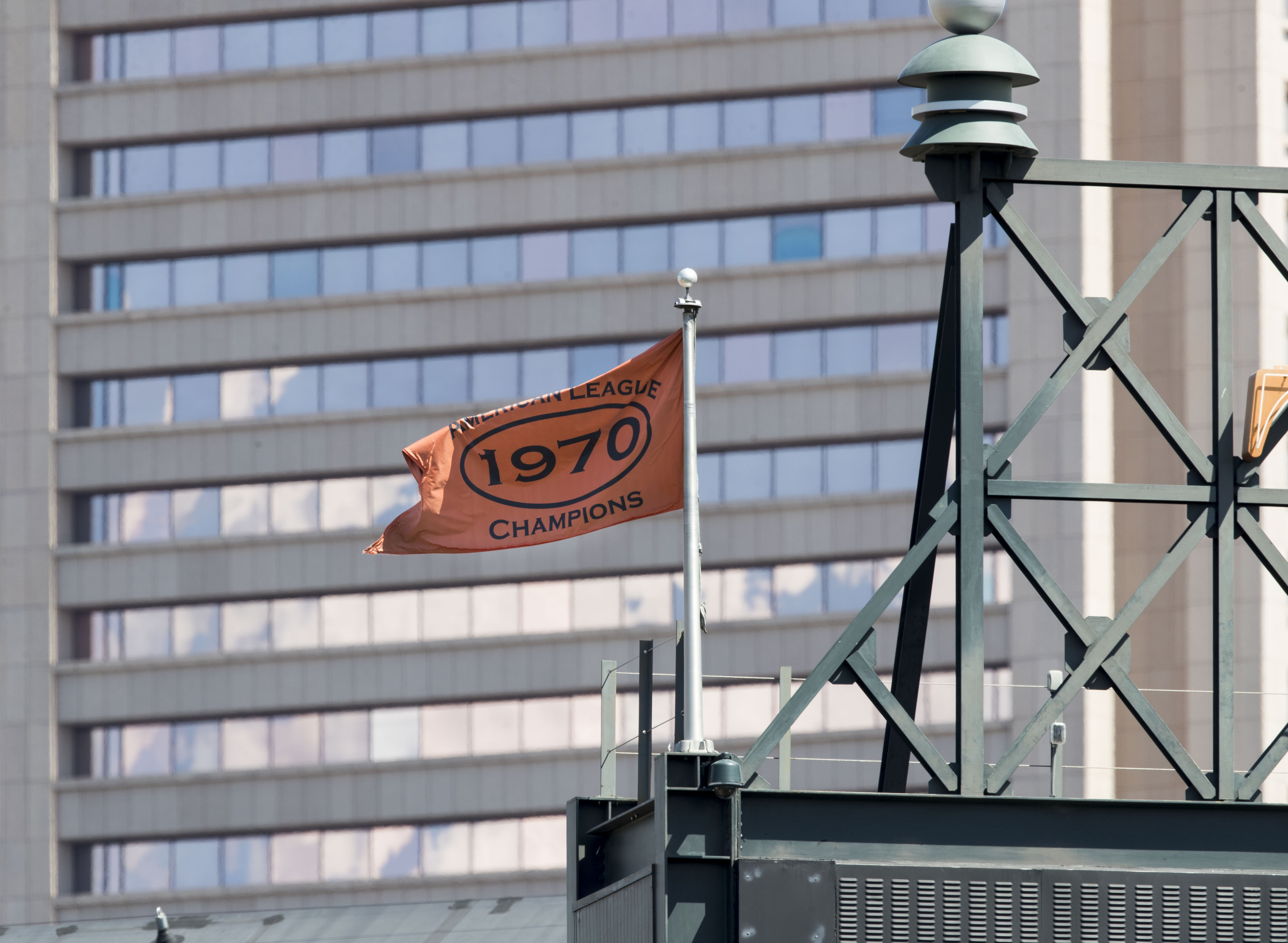 Yankees at Orioles 9/7/17